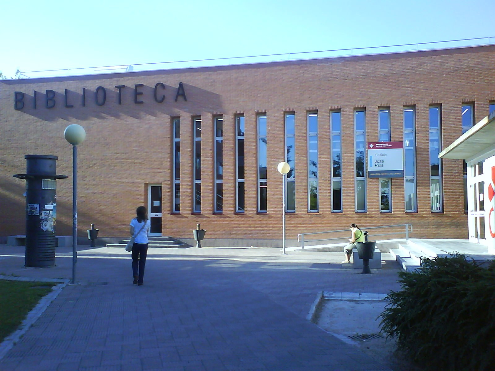 Biblioteca General del Campus Universitario de Albacte de la UCLM en el edificio José Prat.